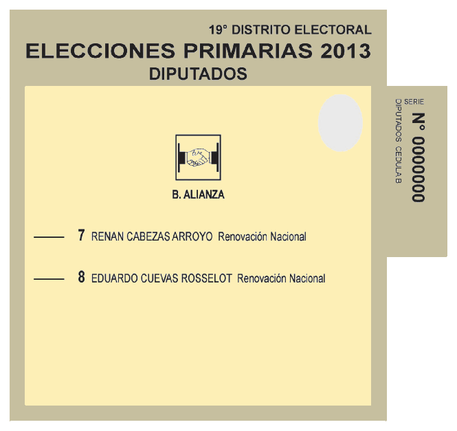 Facsímil de la cédula de votación utilizada en la primaria parlamentaria de Renovación Nacional en el distrito 19 (elección de diputados).